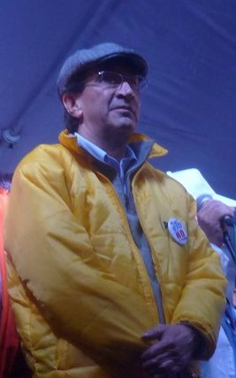 El político del Polo Democrático Alternativo Aurelio Suárez en la manifestacion en contra de la privatización de la Empresa de Telefonos de Bogota ETB